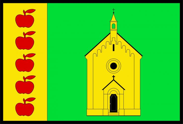 vlajka, Dolany, okres Náchod